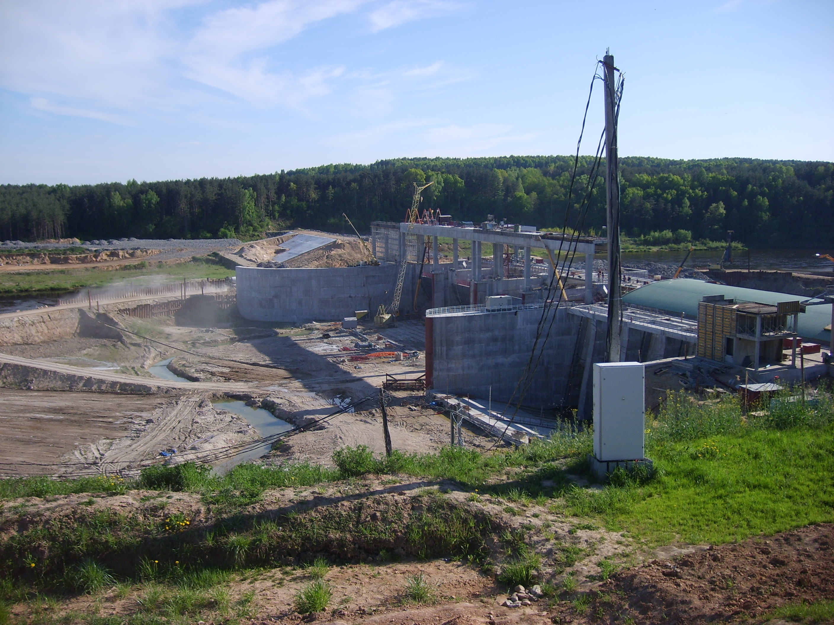 Гидроэлектростанция под Гродно